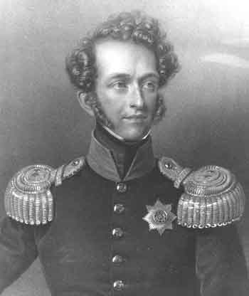 Príncipe Carlos de Hesse Darmstadt (1809-1877)